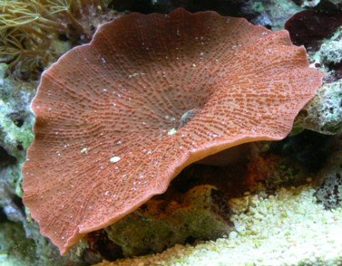 Discosoma sp.